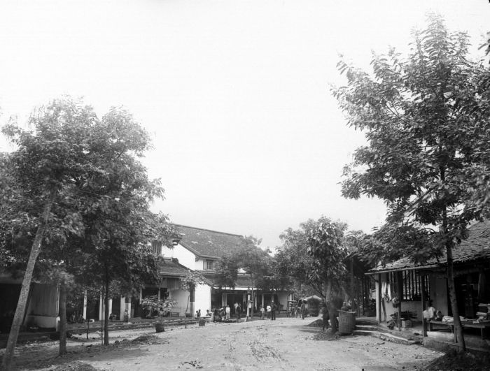 Negatief. Een chinees kamp in Ambarawa op Semarang. Stenen woningen en ruim opgezet. Op de achterrgrond een aantal mensen kijkend naar de fotograaf.. De Chinese wijk te Ambarawa, Semarang